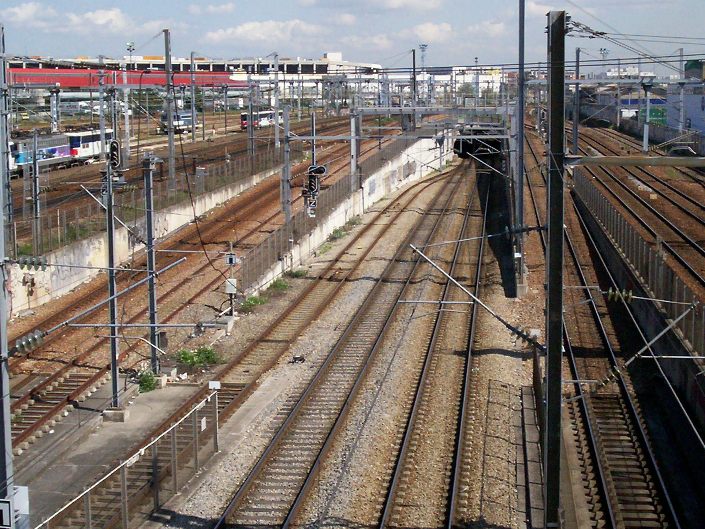 Vue de la fin du tunnel EOLE et de l'entrée du tunnel pour l'accès au garage